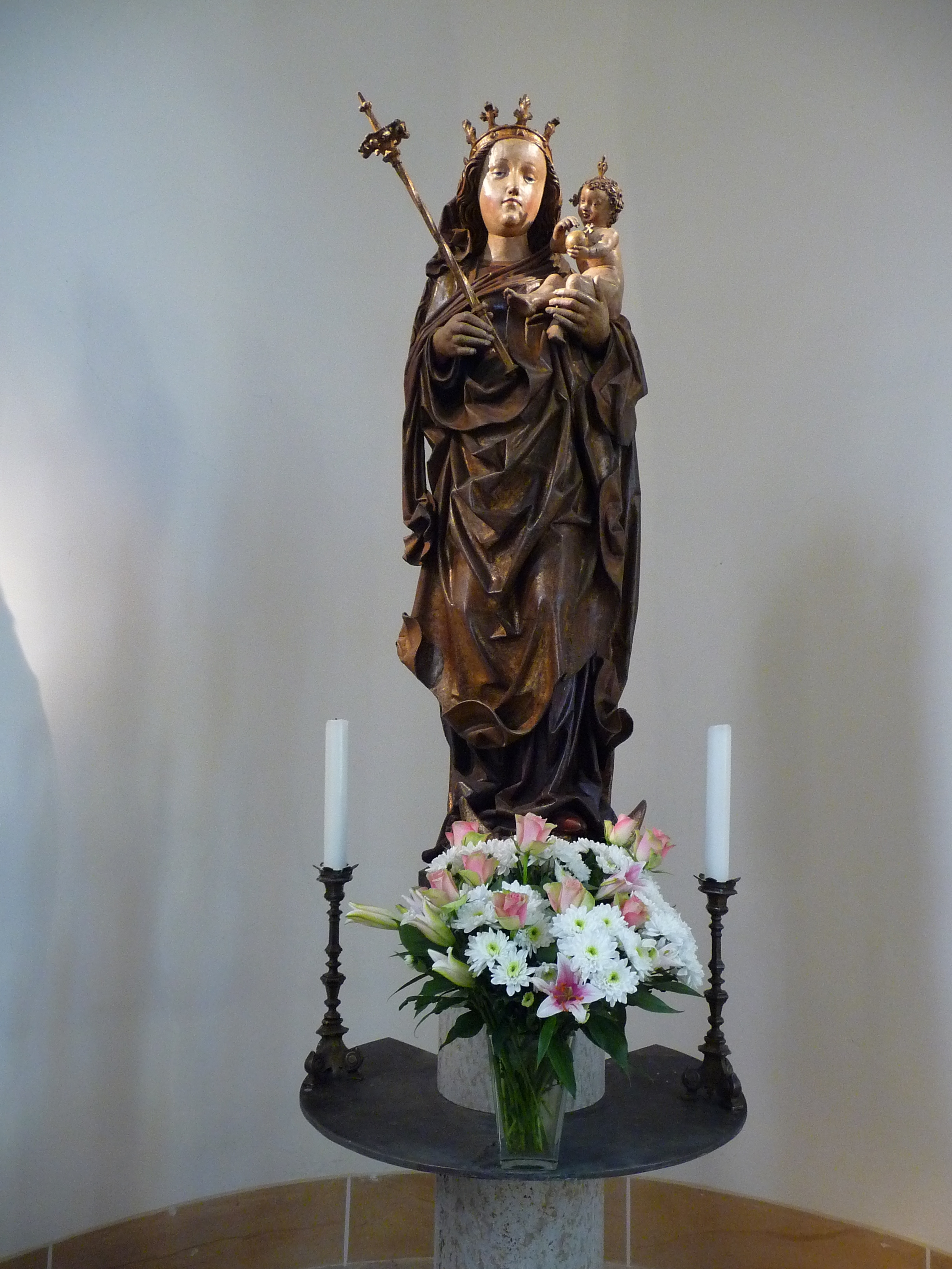 Mondsichelmadonna (spätes 15. Jahrhundert) in der katholischen Kirche St. Raphael in Heidelberg-Neuenheim